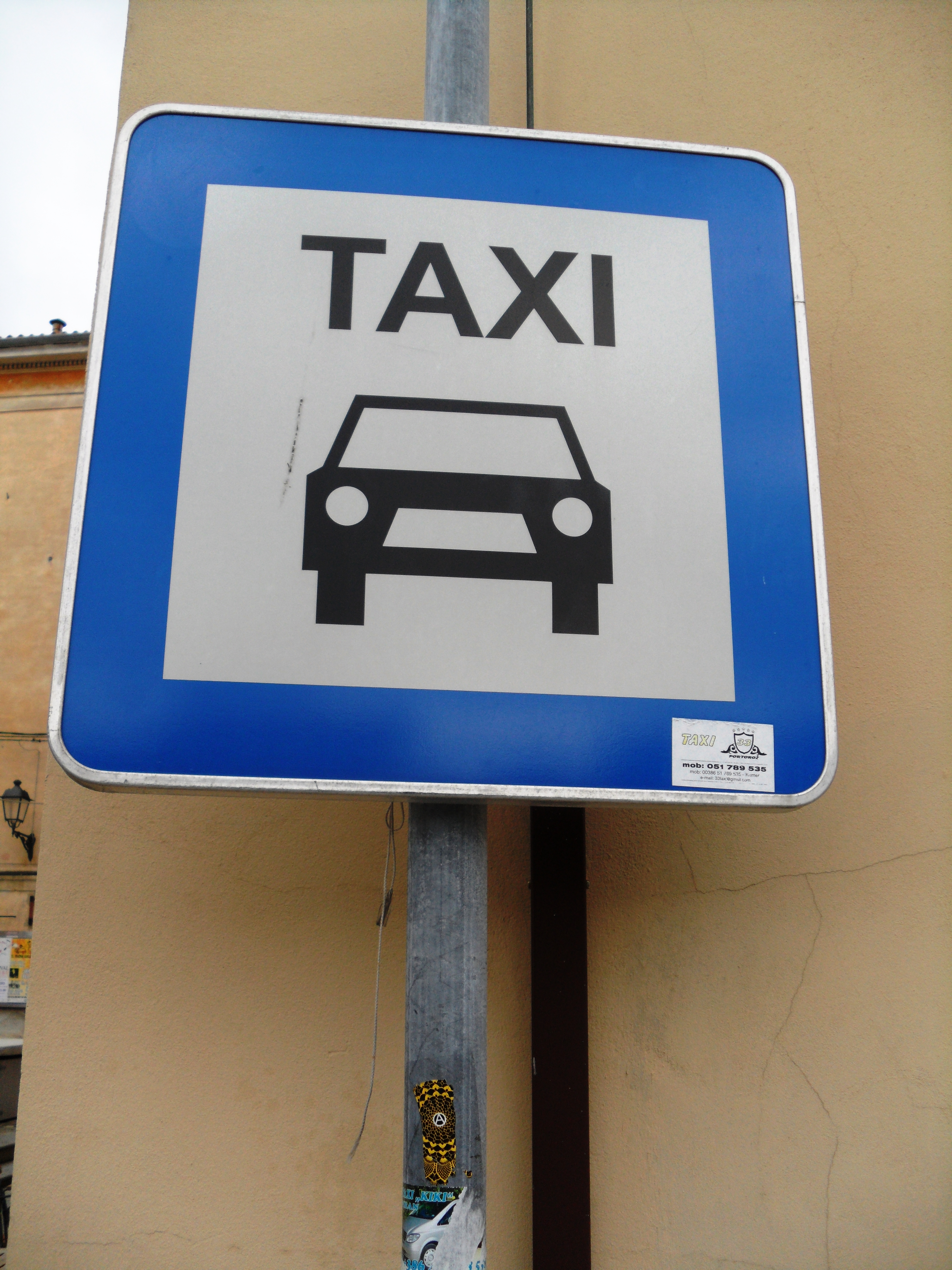 Znak za taksi v Piranu